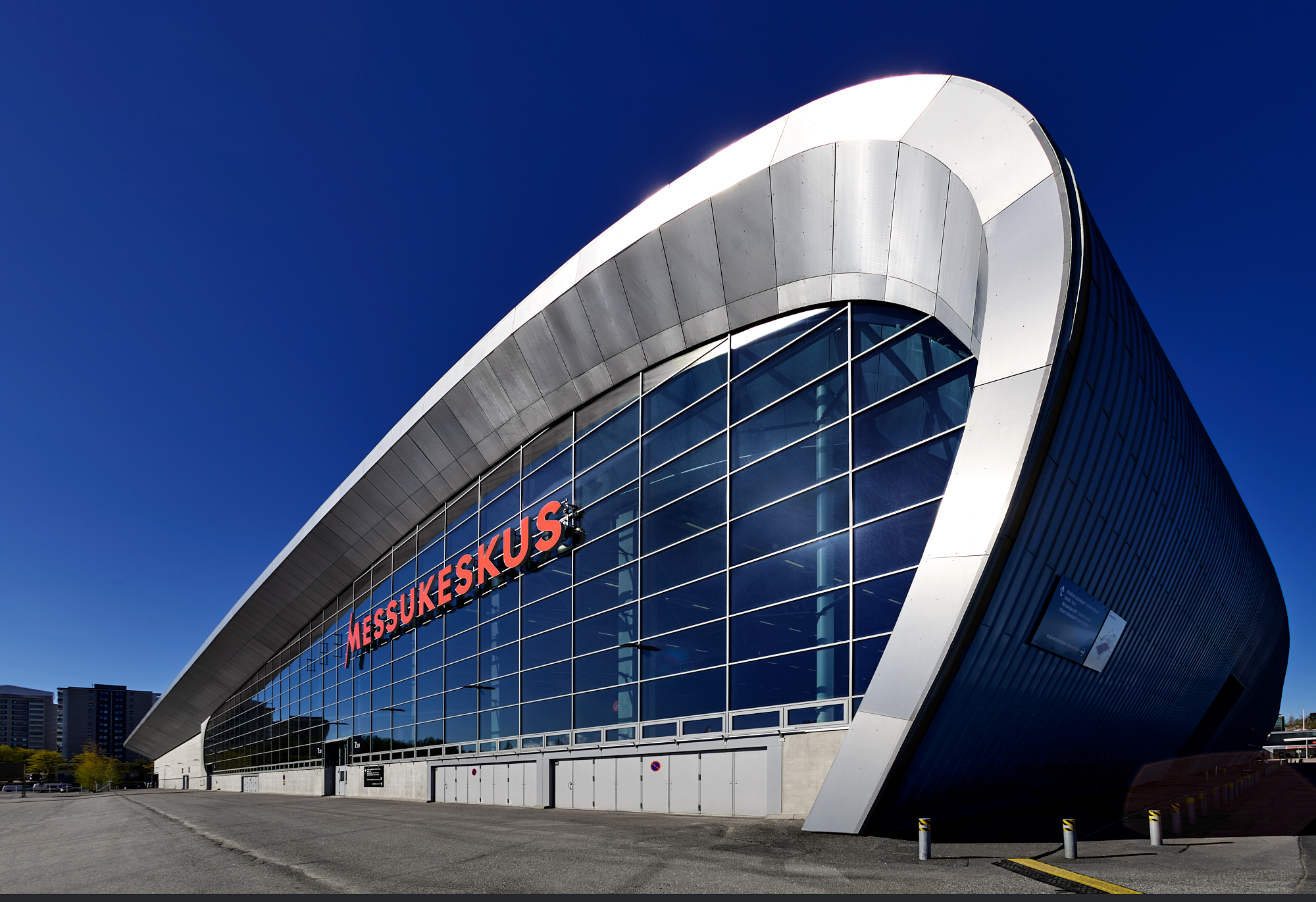 Messukeskuksen halli 7